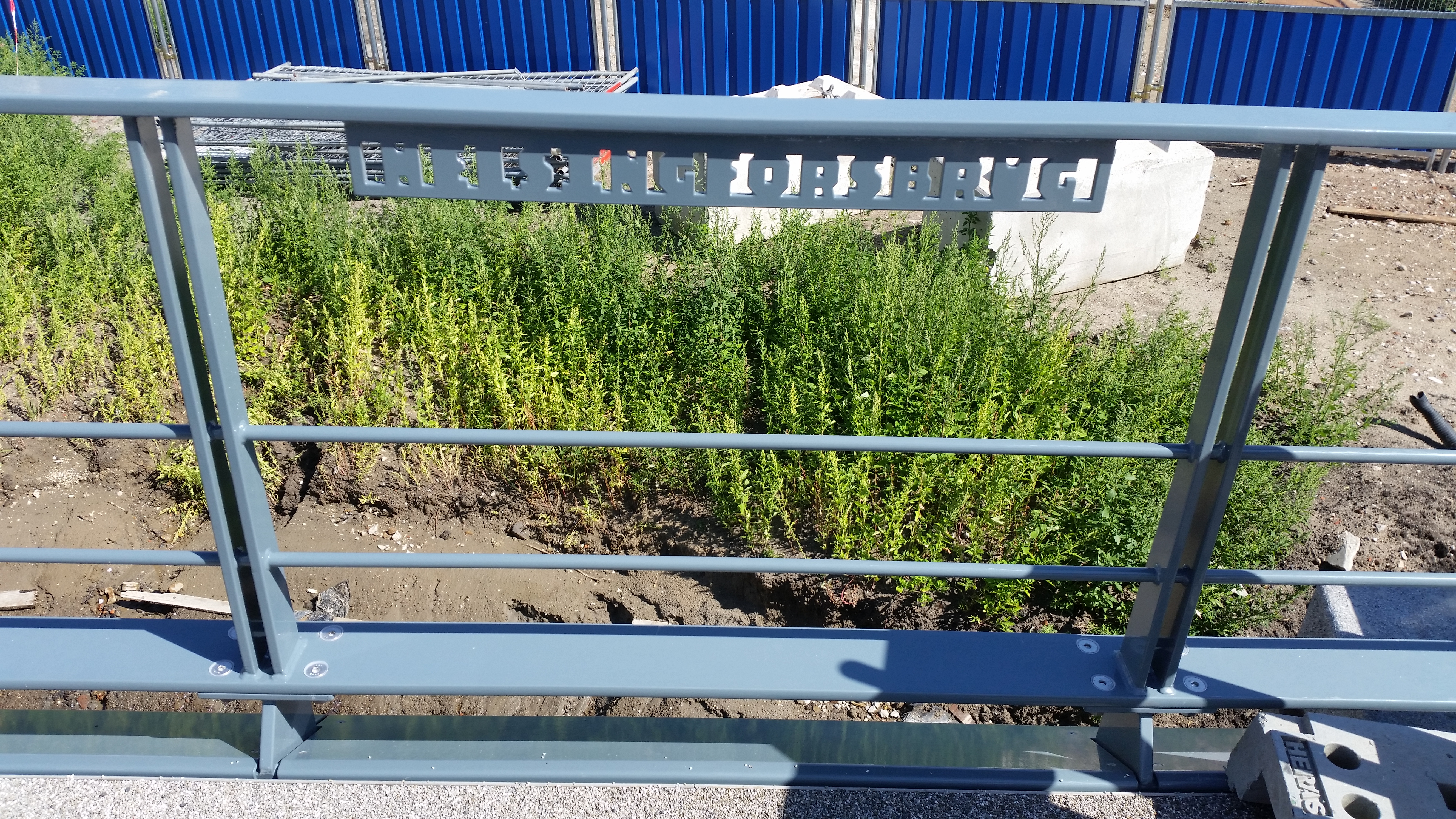 Helsingforsbrug, september 2018, de naamplaat is aangebracht; lettertype van Janno Hahn